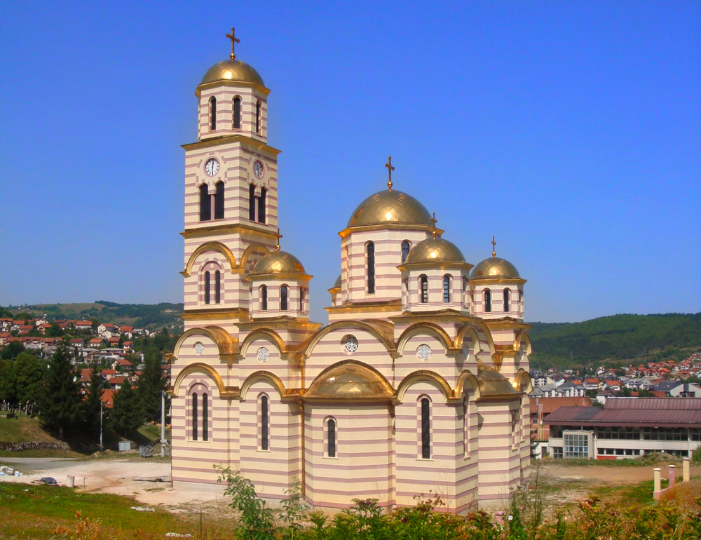 Храм Светог Саве (М. Град)